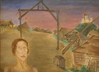 Беларуская (тарашкевіца): Дабрамысьлі (Dabramyśli), пляц Рынак (plac Rynak). Касьцёл (Пакроўская царква?) па маскоўскай перабудове